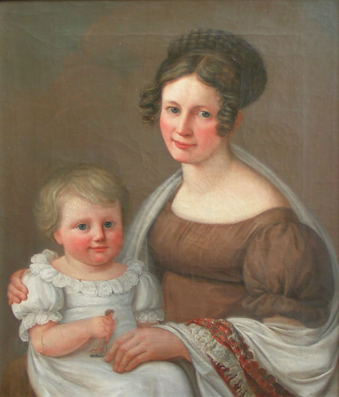 Reproduktion eines Ölgemäldes, darstellend die Ehefrau des Großherzoglichen-Sächsischen Kanzlers Gustav Wittich, Anna Maria Wittich, geb. Gau (1789-1842), nebst ihrem Töchterchen Mathilde um 1818.